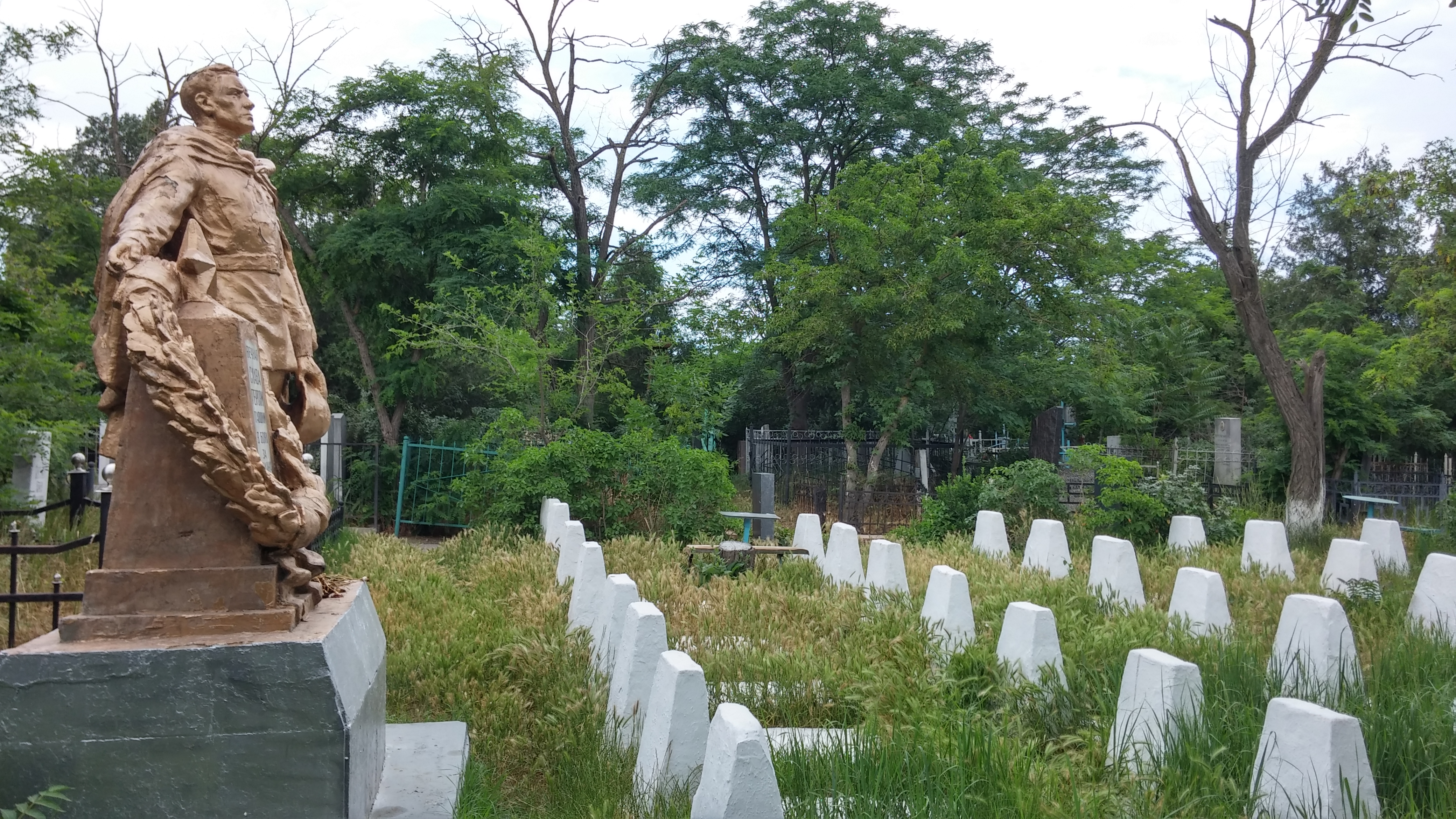 Братская могила советских воинов, умерших от ран в госпиталях в годы Великой Отечественной войны 1941-1945 гг. на могиле установлен памятник: кладбище, Махачкала, Дагестан